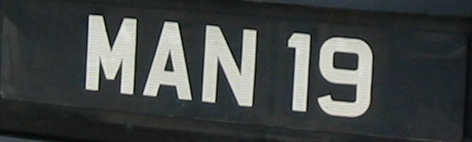 Man kentekenplaat